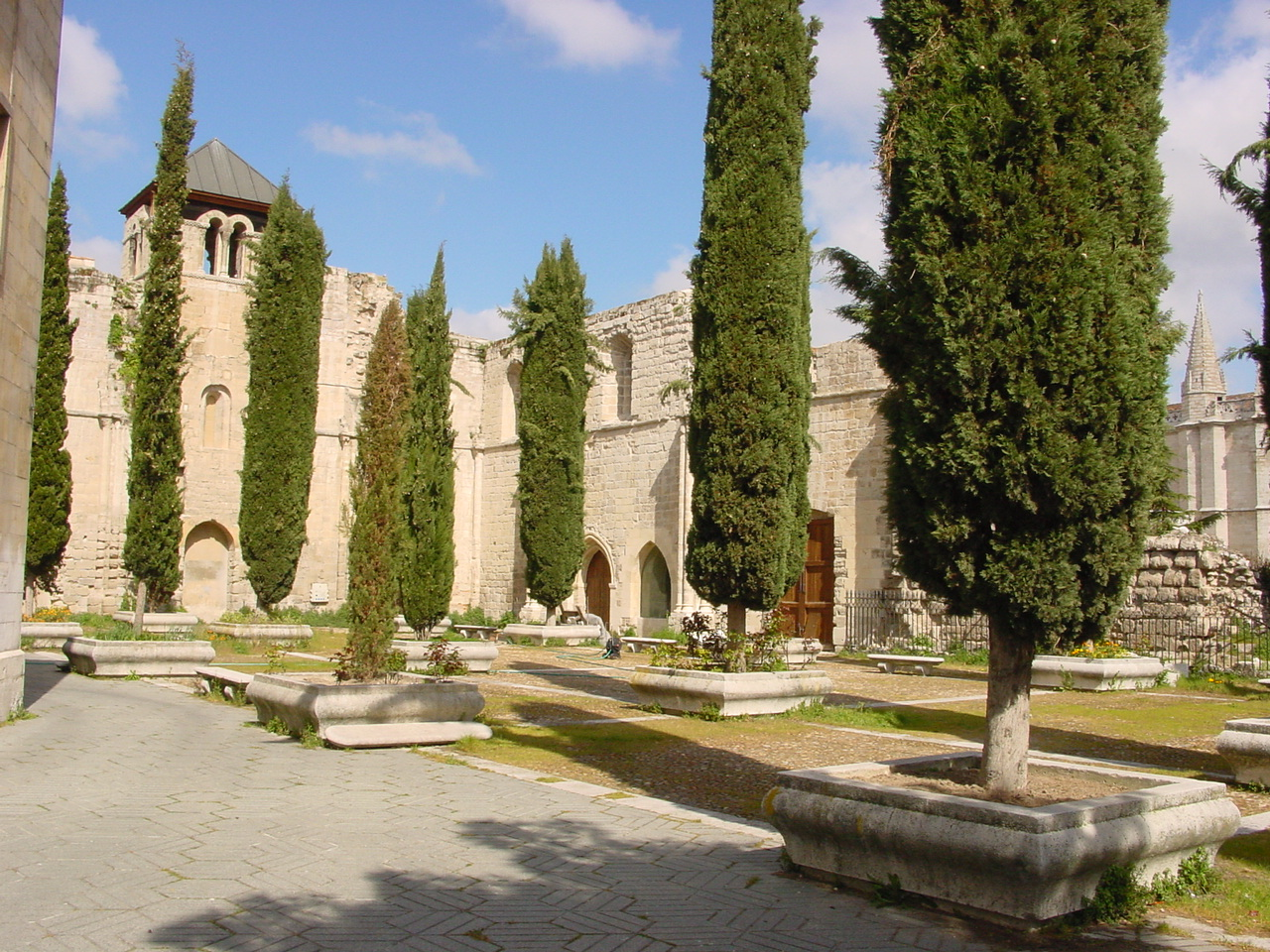 Ruinas de la antigua Colegiata de Santa María (del siglo XIII) en Valladolid (España). Los cipreses marcan lo que fueron los pilares y división de las tres naves. Ruins of the ancient collegiate church of Santa María (13th century) in Valladolid. The cypresses show the division of the three naves and where the pillars raised.